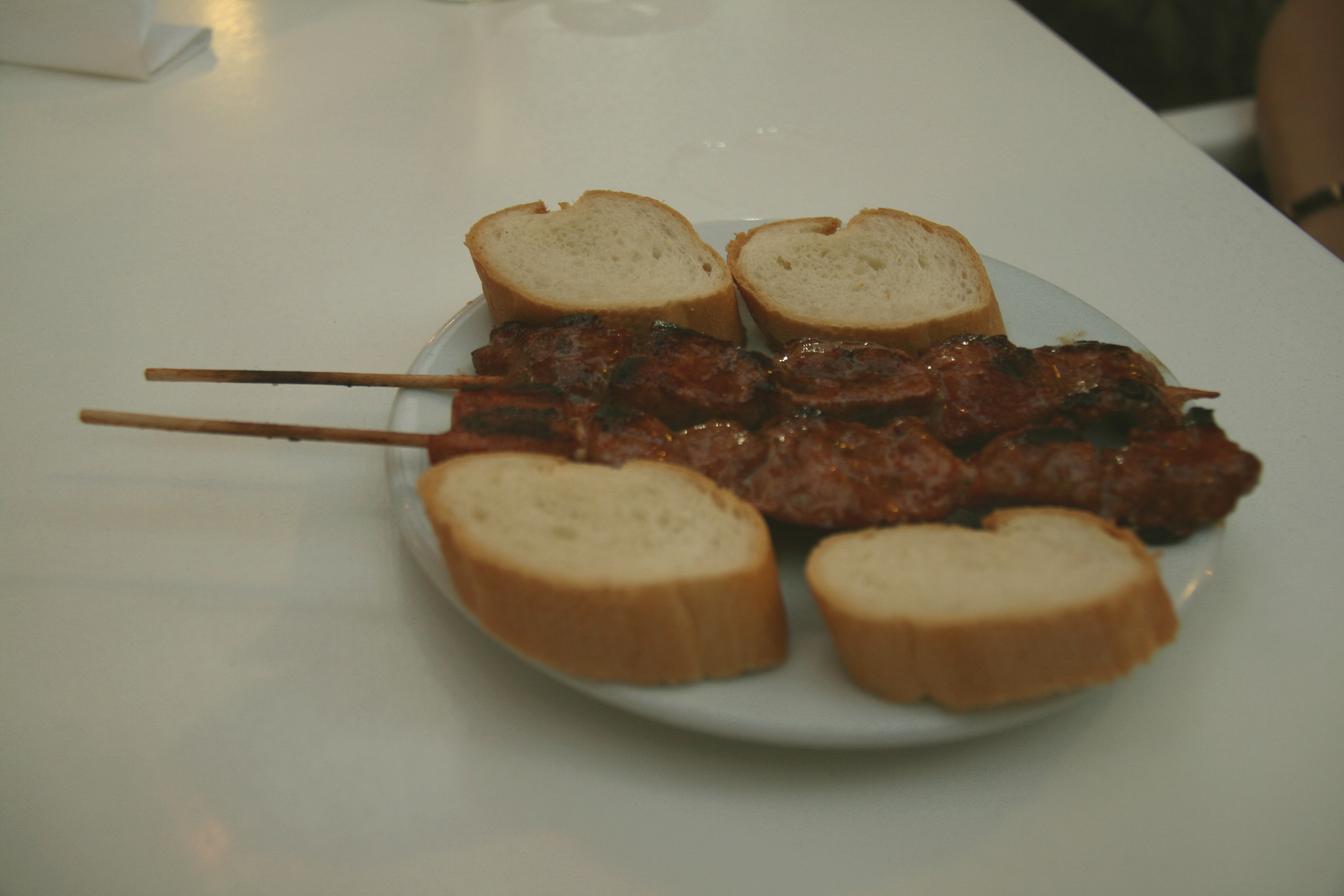 pincho moruno - Zamora